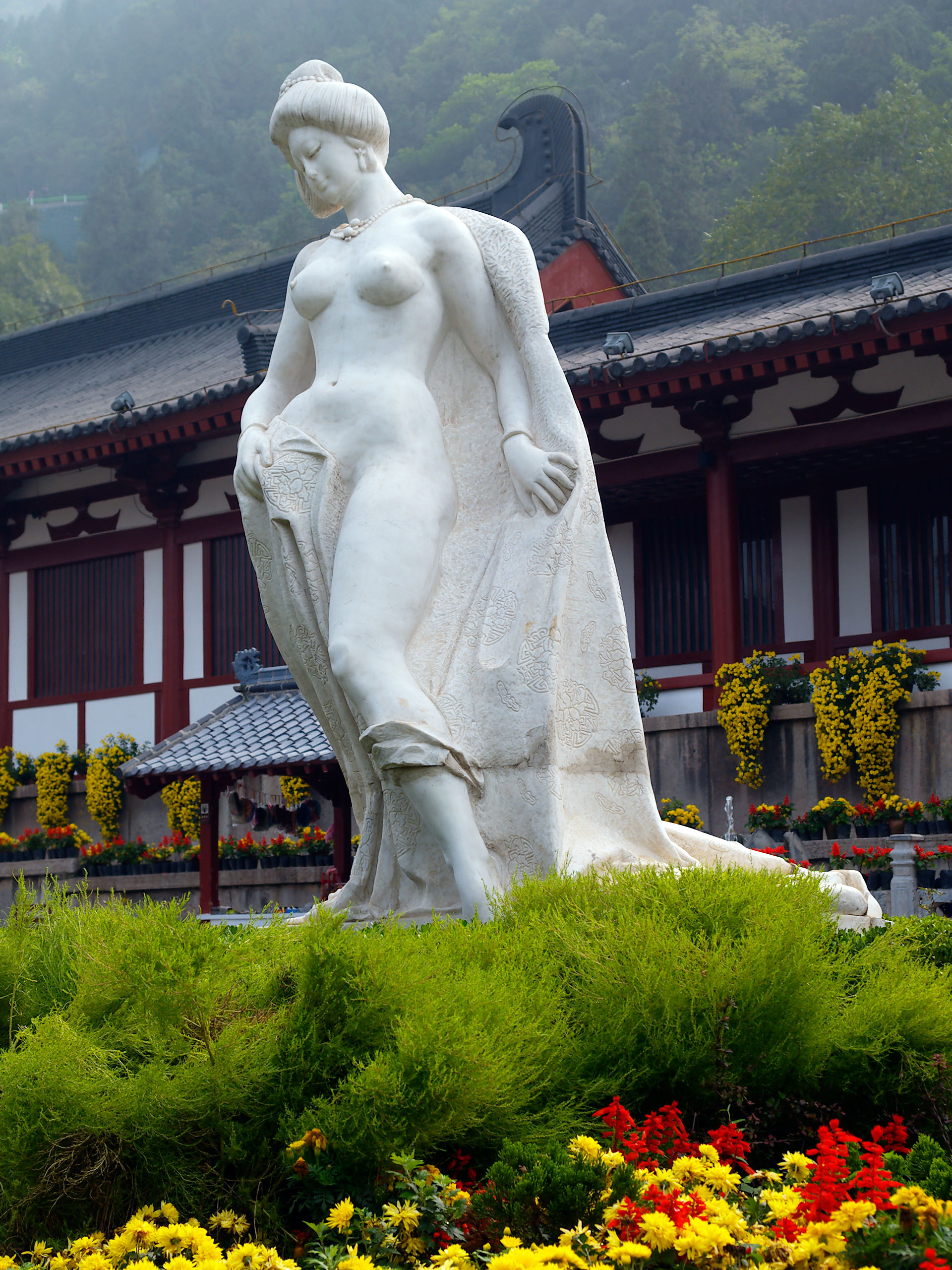 華清池楊貴妃入浴像